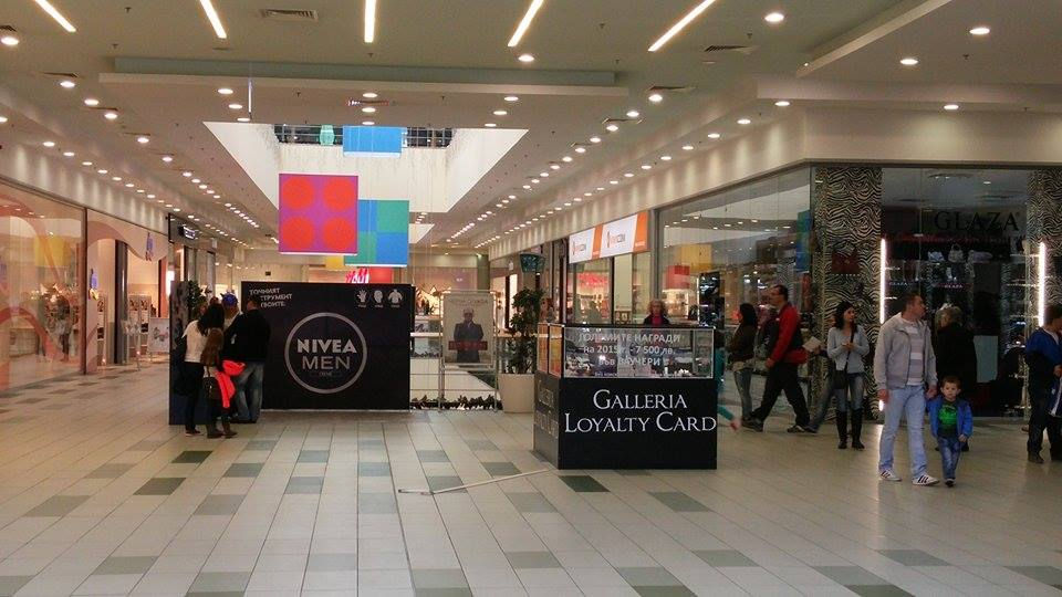 Вход на Мол Галериа Стара Загора